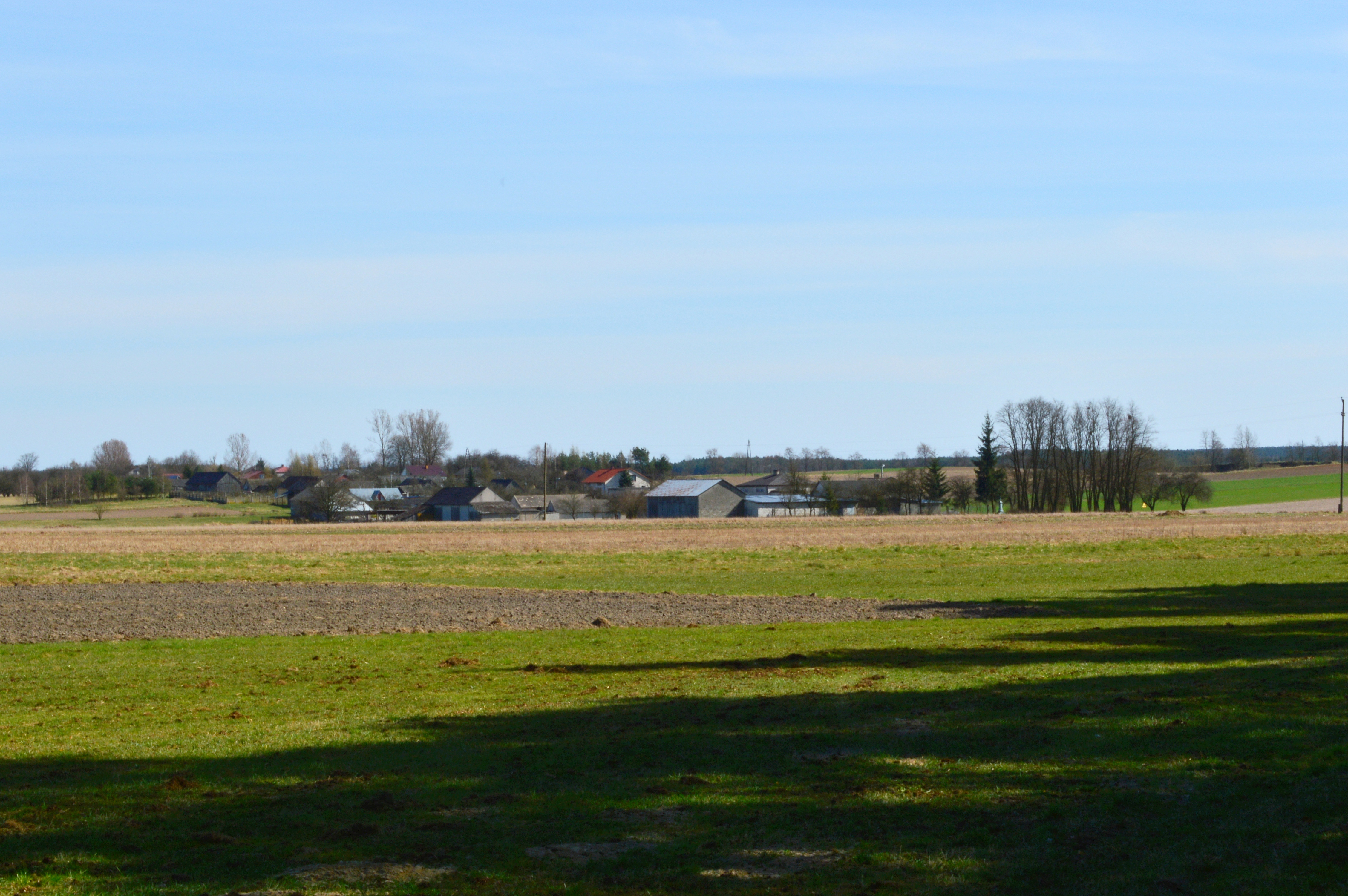 Kotuszów północno zachodnia część wsi